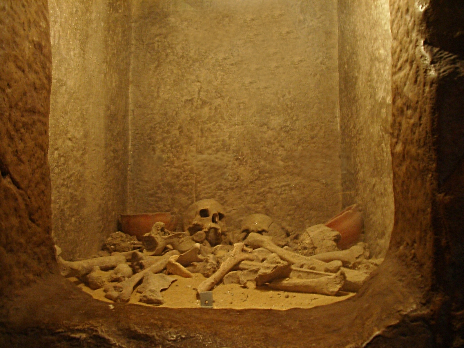 Restes humanes al Bardo